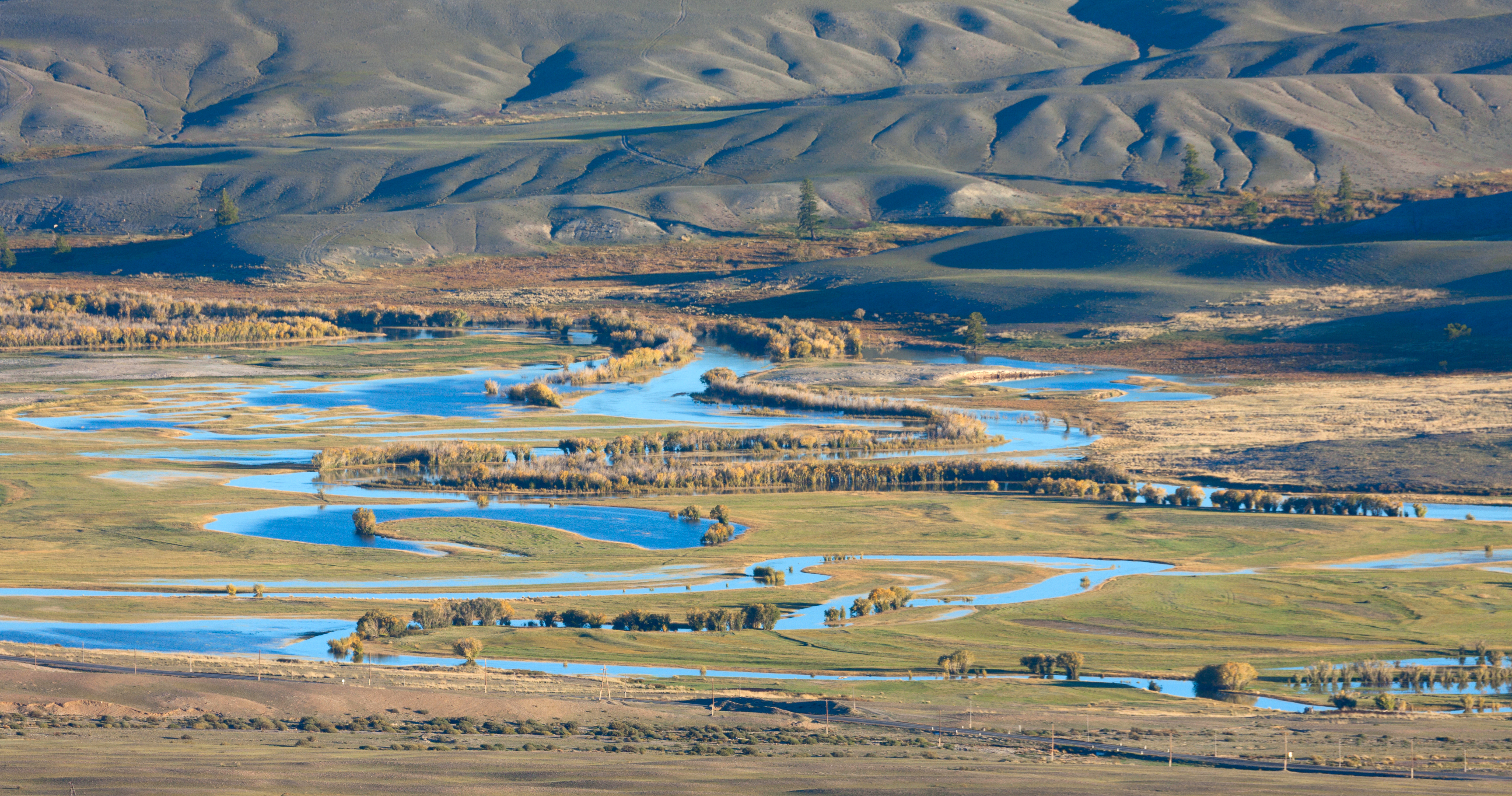 Река Чуя